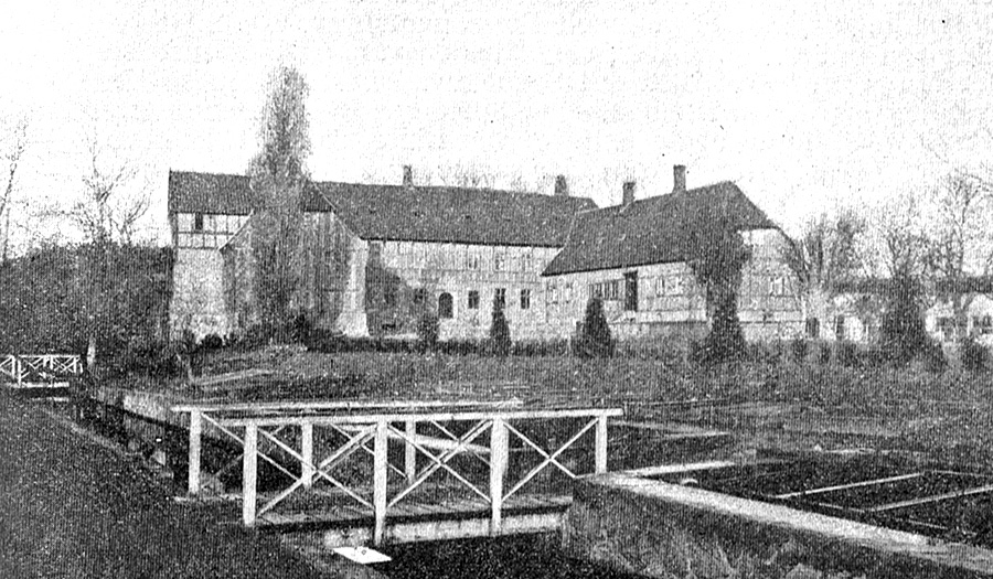 Stensgård er en gammel Sædegård, som nævnes første gang i 1391. Gården ligger i Svanninge Sogn, Sallinge Herred, Faaborg Kommune. Hovedbygningen er opført i 1523 og ombygget i 1625